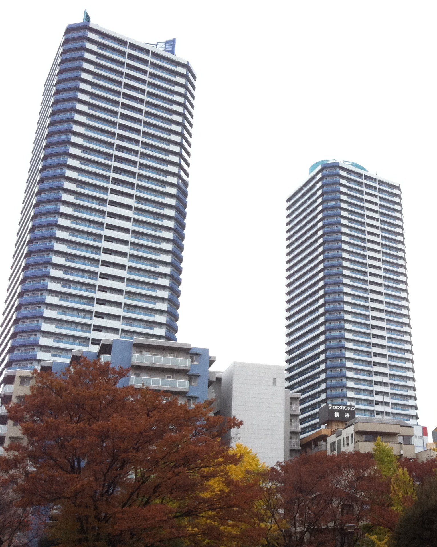 ヨコハマポートサイド地区のタワー・ウエスト（右）とタワー・イースト（左）。